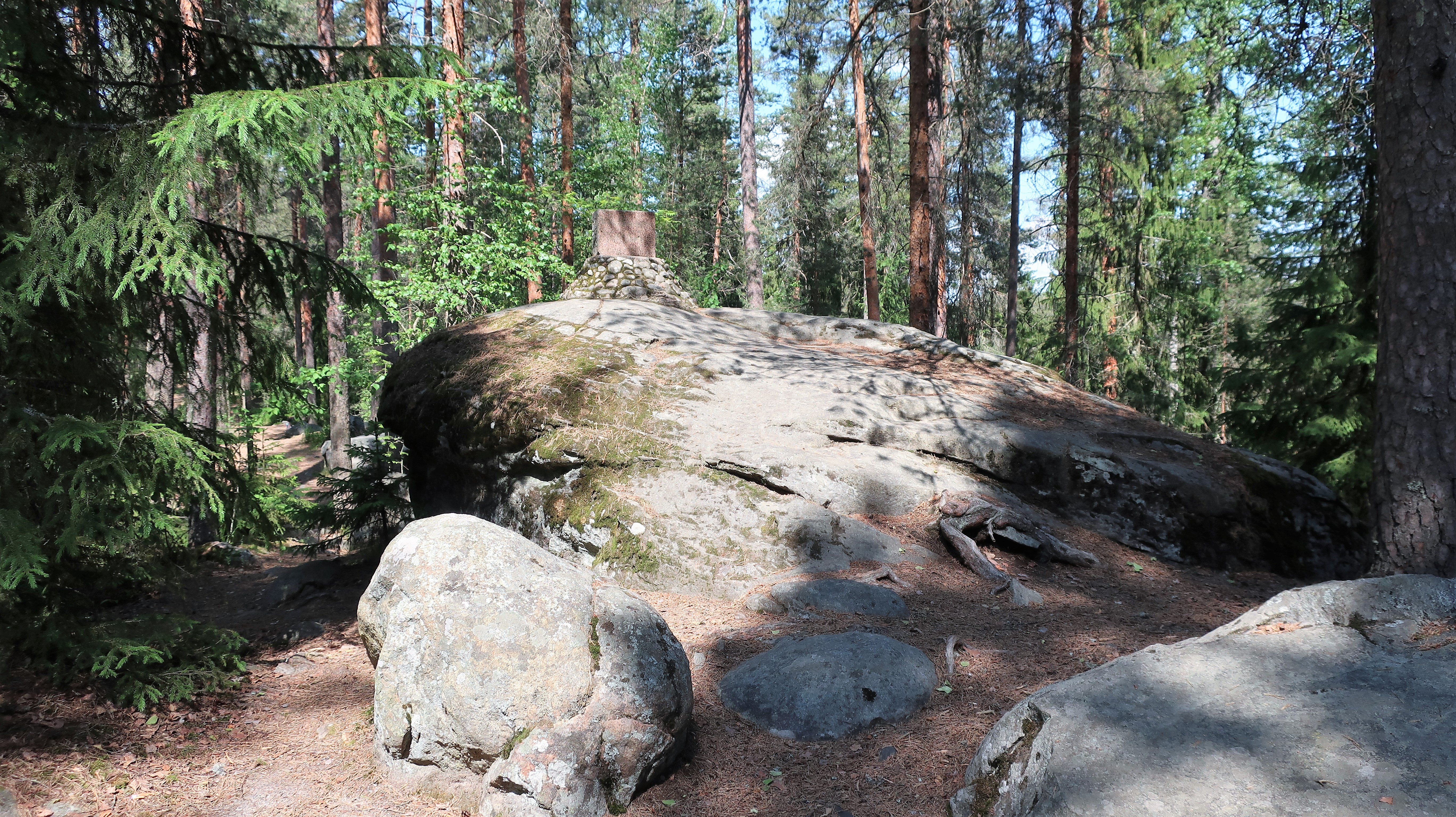 yleiskuva muistomerkistä, siirtolohkareesta ja ympäristöstä